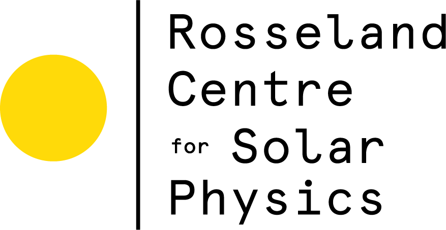 RoCS logo